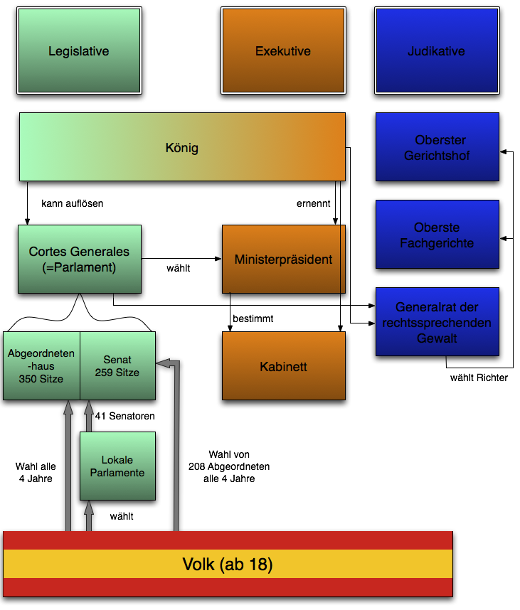 das politische System Spaniens